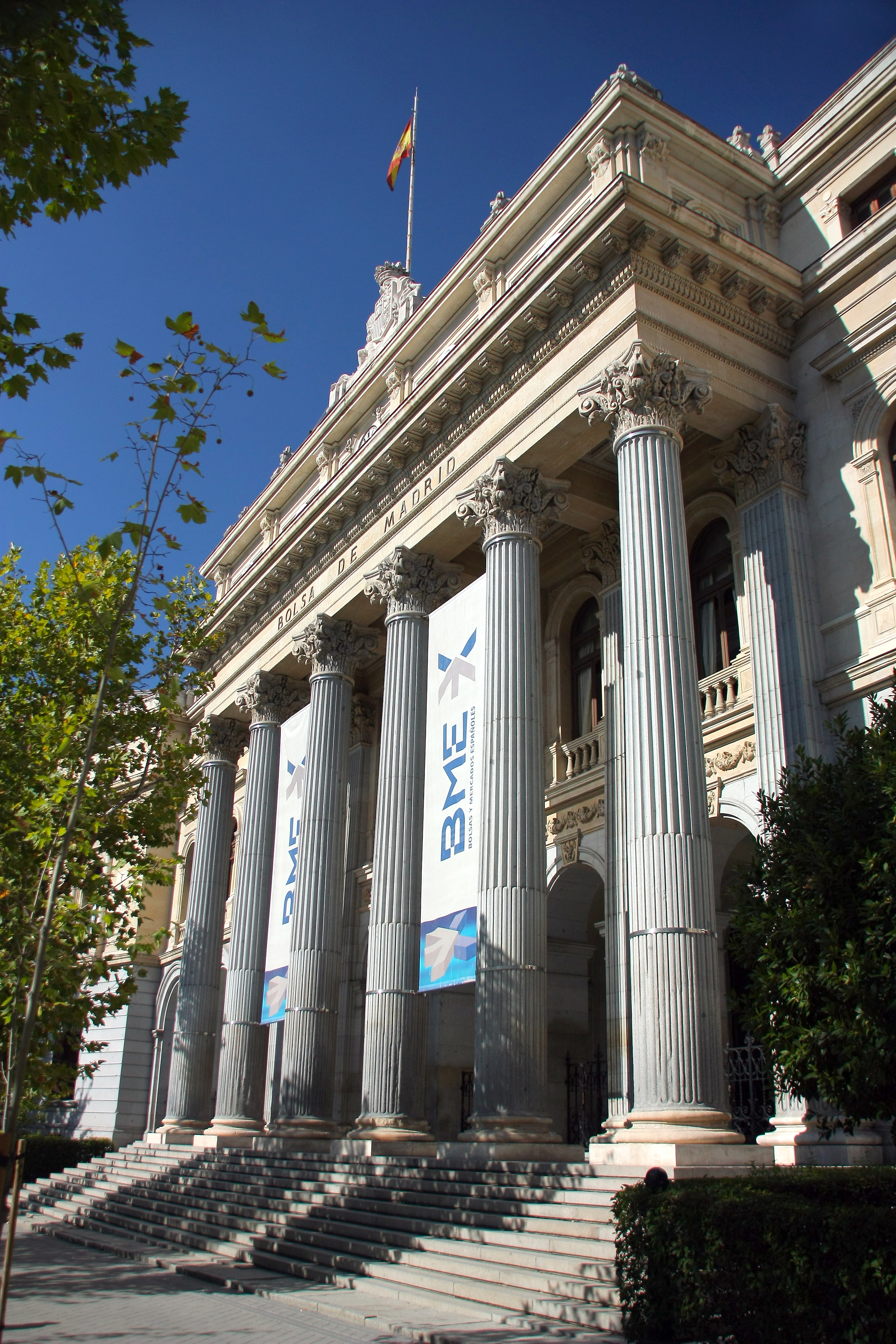 Bolsa de Madrid, España. 2008.